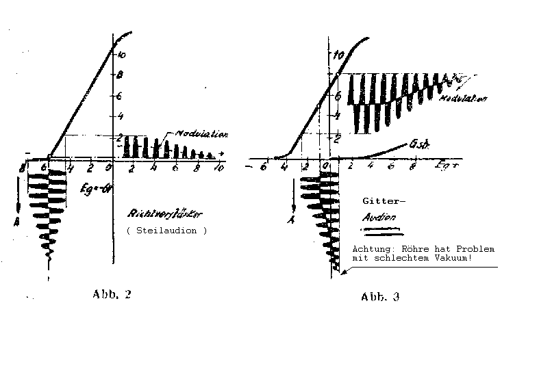 Steil_Gitter_Audion